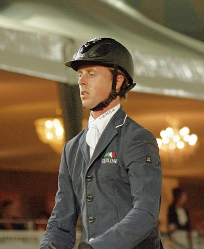 Ben Maher lors du Grand Prix Global Champions Tour de Cannes.